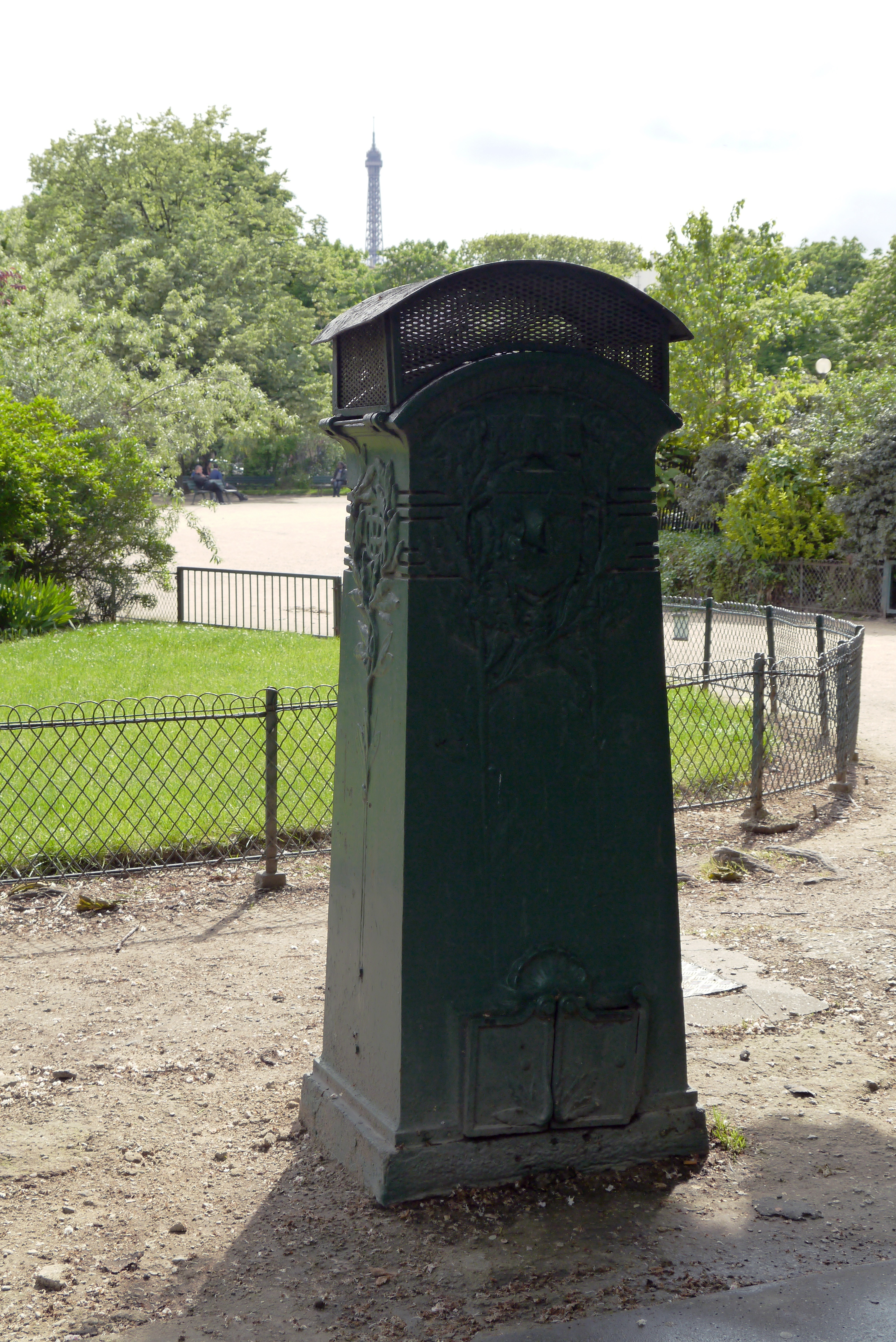 Sur l'avenue Gabriel, l'une des dernières boites à sable de Paris. Petits édicules en fonte, elles stockaient le sable utilisés par les cantonniers pour sabler les voies en cas de neige. Désormais inutiles, celles qui restent ont été reconverties en cheminée d'aération du métro.